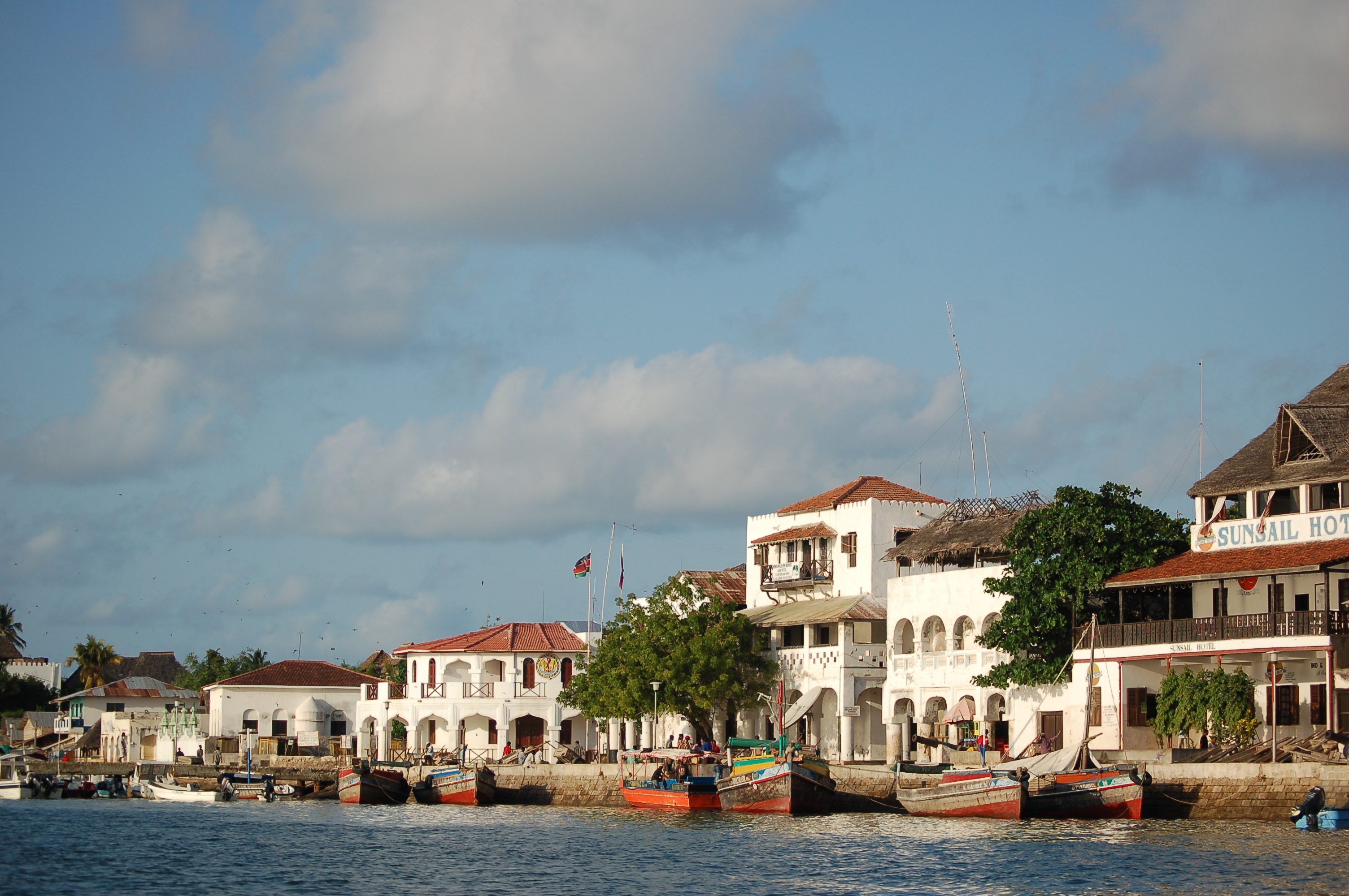 Lamu, Lamu Island